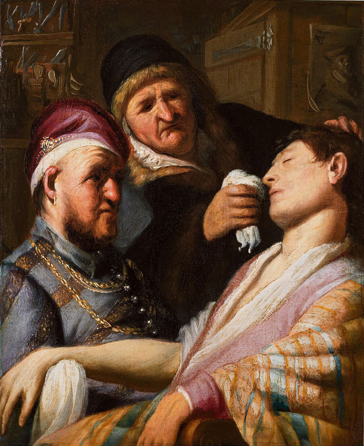 Rembrandt Harmenszoon van Rijn De Geur uit de Leiden Collection